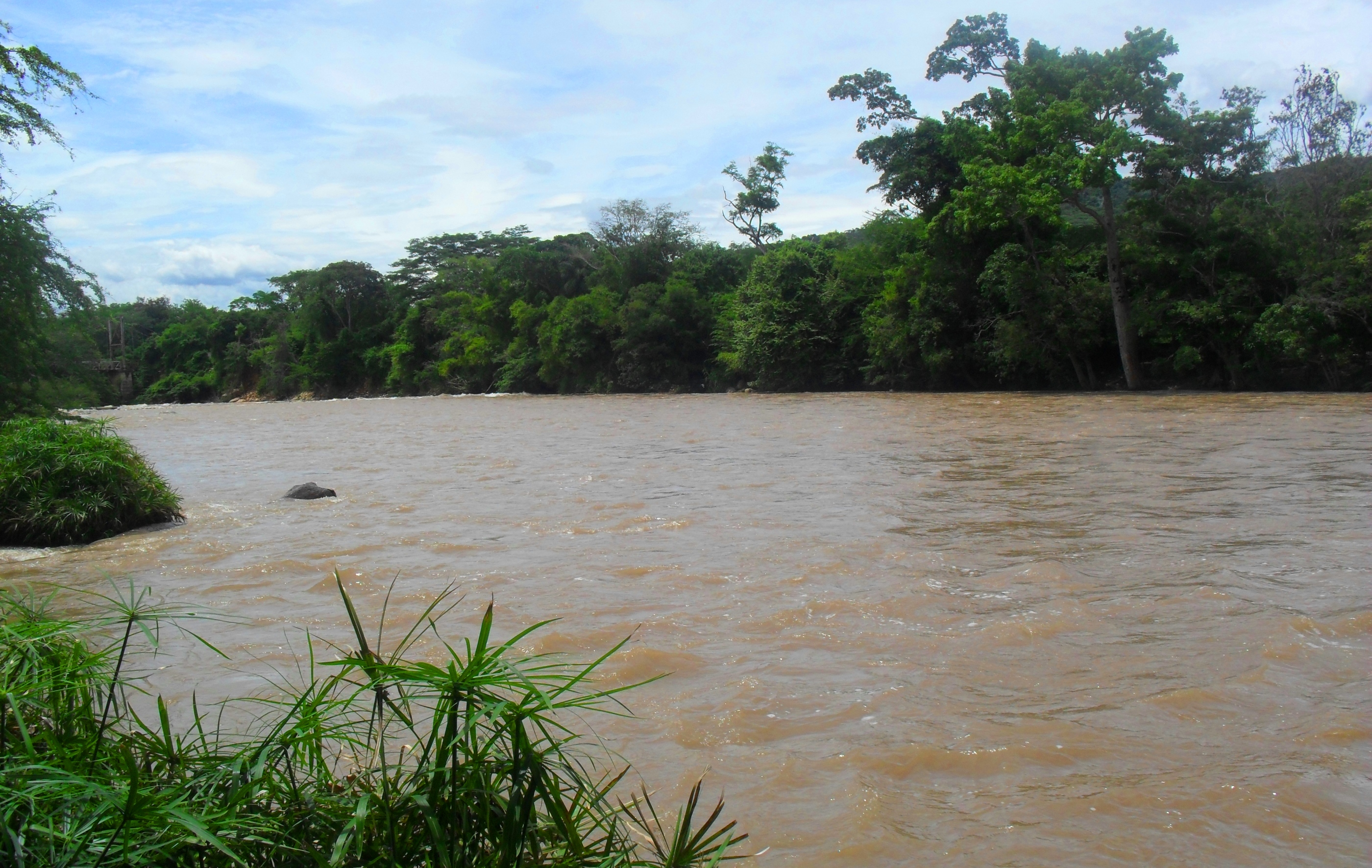 Foto del río zulia en el norte del municipio de Duranía NS,Colombia